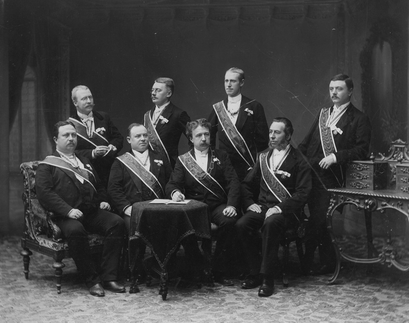 Sällskapet CC:s Höga Råd a 1890. Sittande i mitten stormästaren Nils Flensburg. Bildkälla: AFs Arkiv & Studentmuseum.